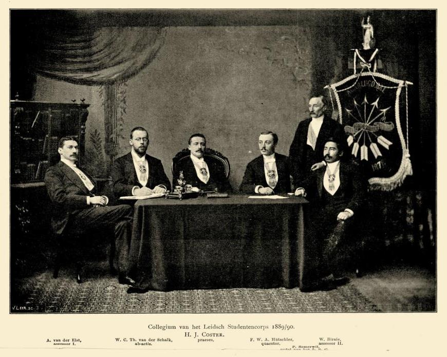 Collegium Leidsch Studenten Corps 1889-1890. V.l.n.r.: A. van der Elst (assessor I), W.C.Th. van der Schalk (ab-actis), H.J. Coster (praeses), F.W.A. Hutschler (quaestor), W. Birnie (assessor II). Staande: P. Somerwil (pedel van het L.S.C.).